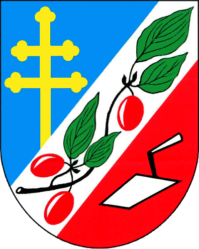 Wappen von Šumice